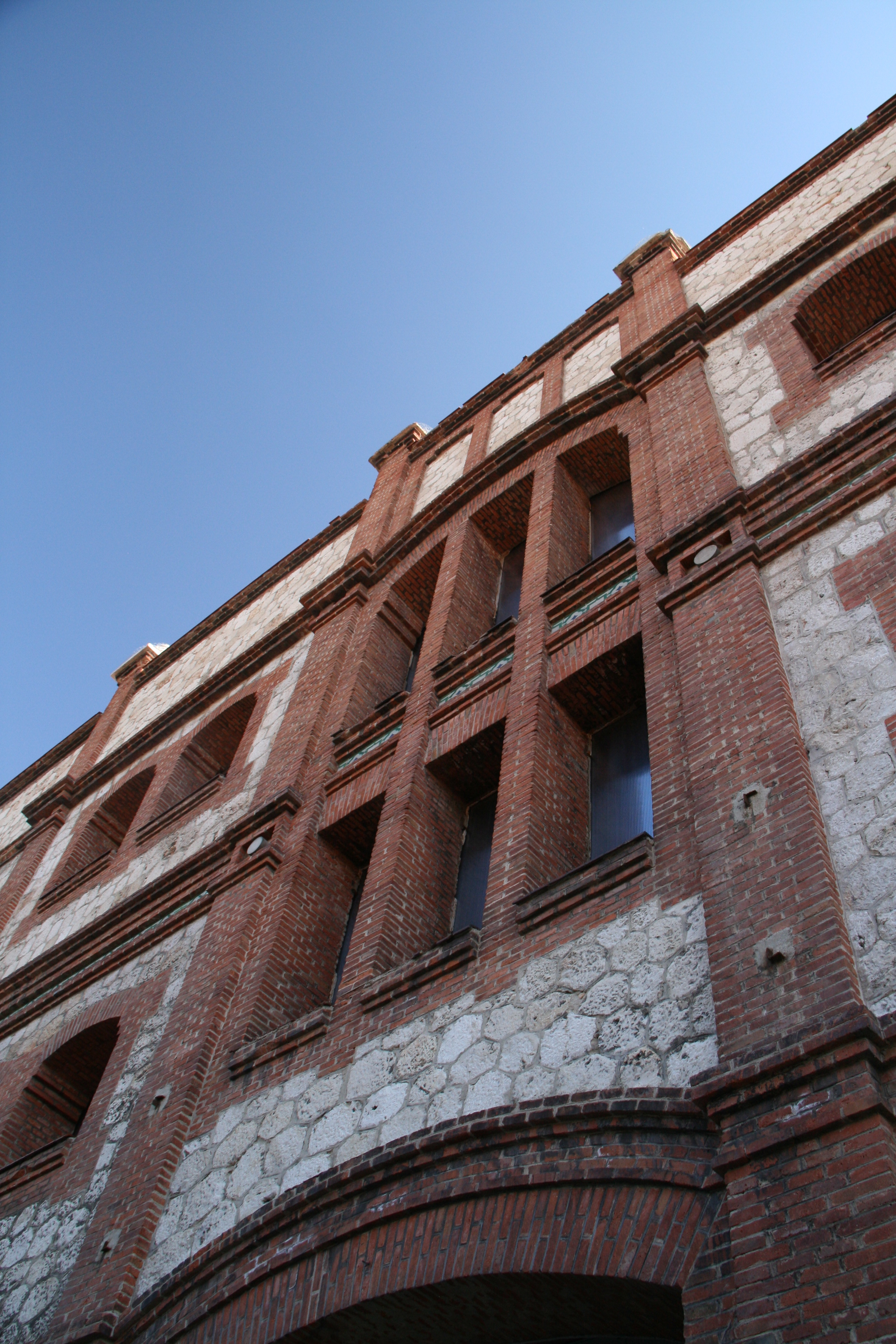 Matadero de Legazpi - Acceso a la Mondonguería, secado de pieles y vaciado